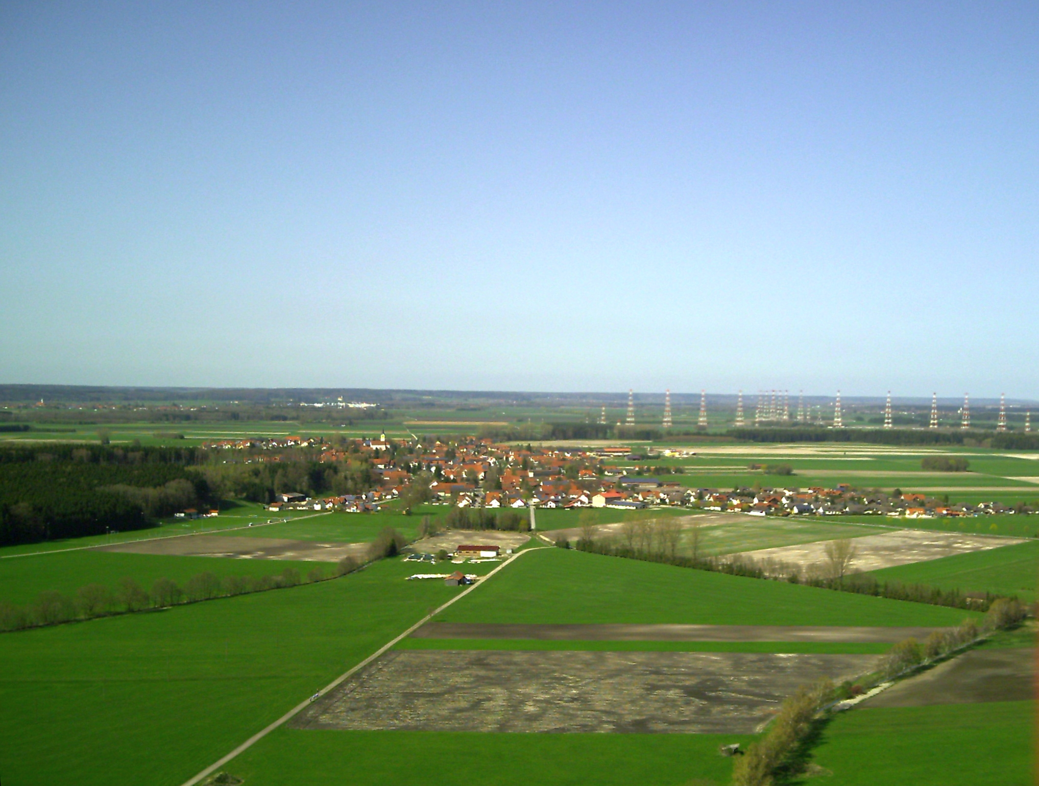 Amberg im Unterallgäu von Süden